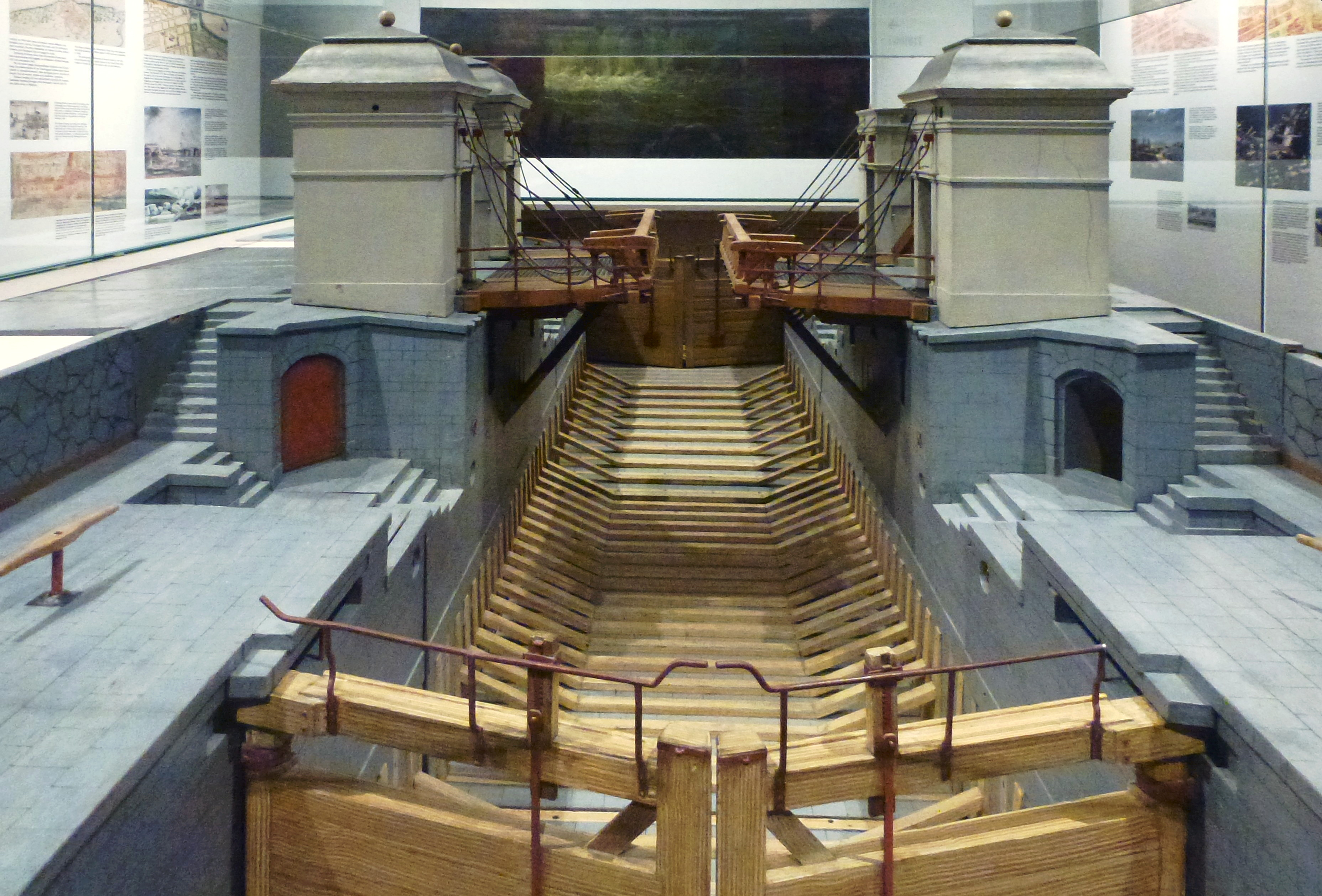 Modellen för Polhemsslussen, vy mot Saltsjön